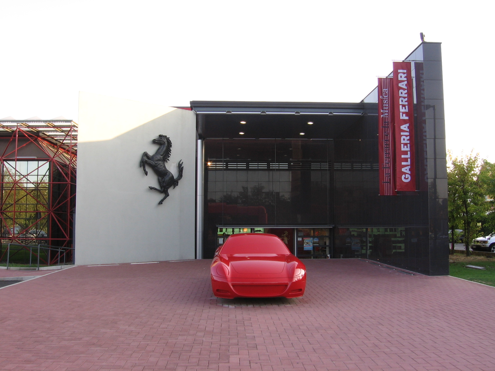 Entrance to the Galleria Ferrari